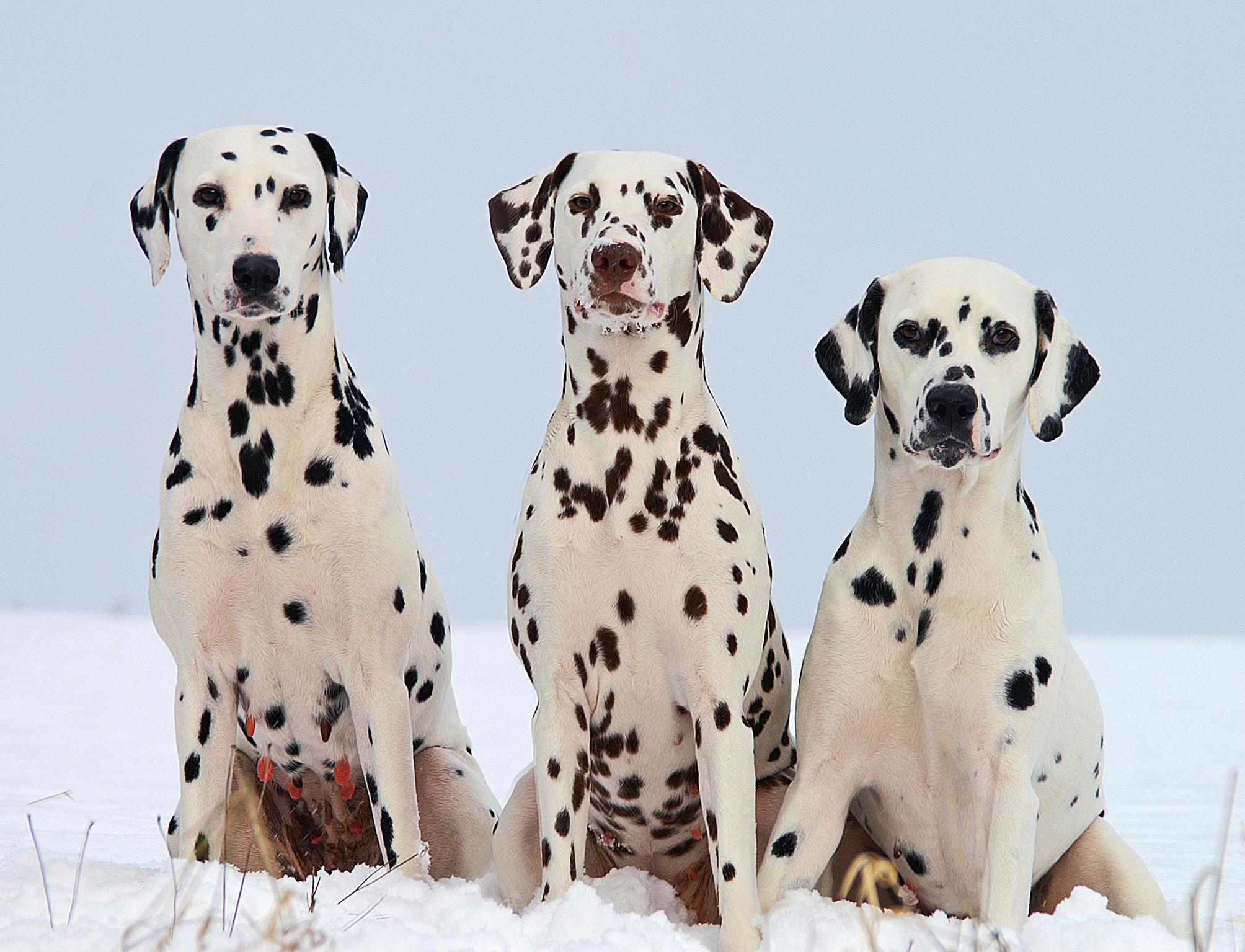 Die verschiedenen Farben eines Dalmatiners